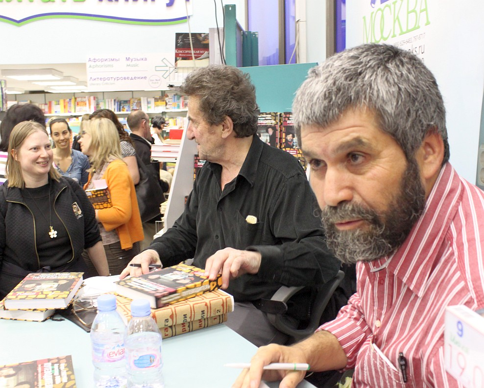 Igor Guberman